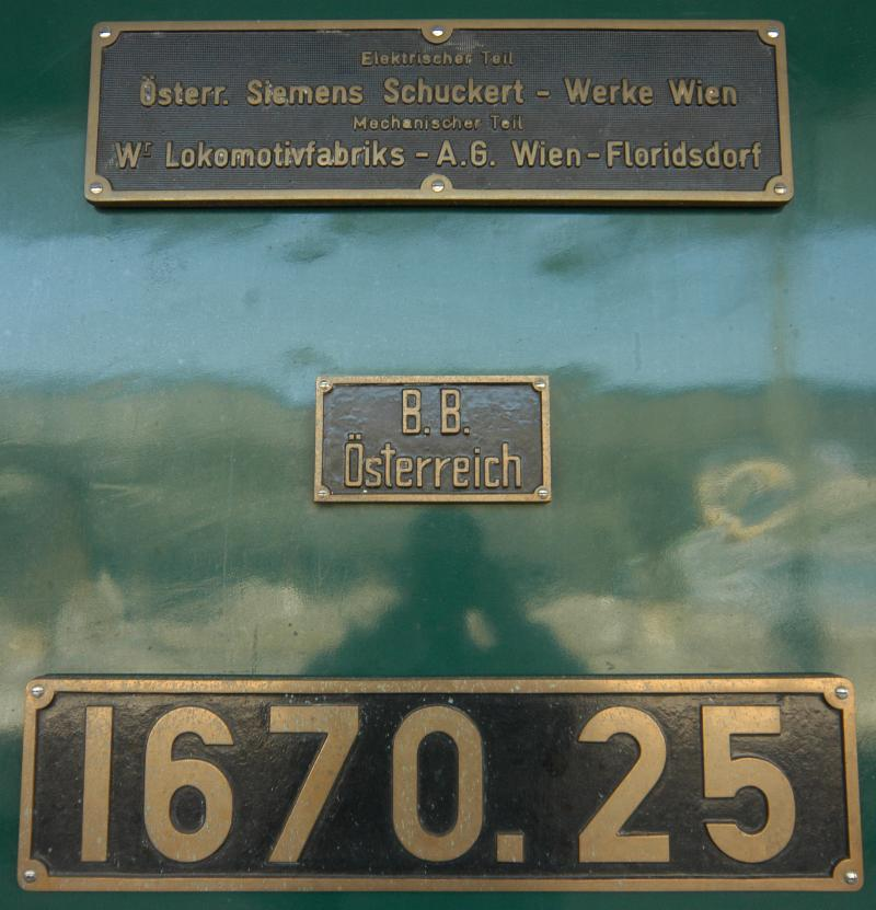 Typenschild einer in der Floridsdorfer Lokomotivfabrik gefertigten Lok